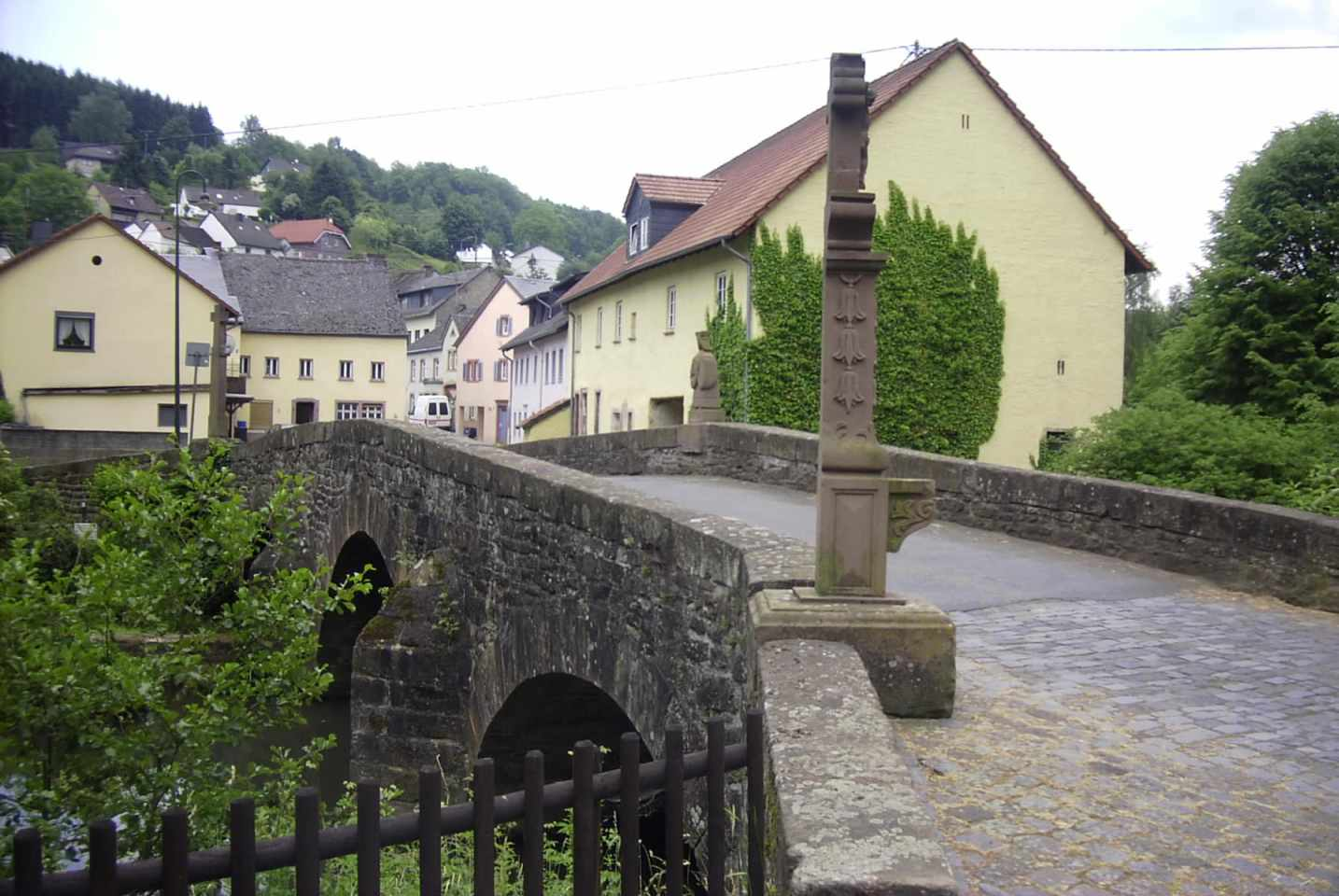 Bildbeschreibung: Brücke über die Nims in Seffern Quelle: eigenes Foto Fotograf/Zeichner: bodoklecksel 14:32, 26. Jun 2006 (CEST) Datum: Juni 2006 Sonstiges